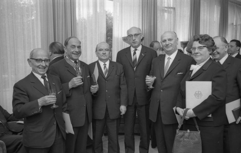 Empfang und Ordensverleihung an Bundestagsabgeordnete durch Bundestagspräsident Dr. Gerstenmaier, Bonn (Hellenbrock, Hamacher, Mayer-Wanne-Eickel, Erler, Frau Wessel)